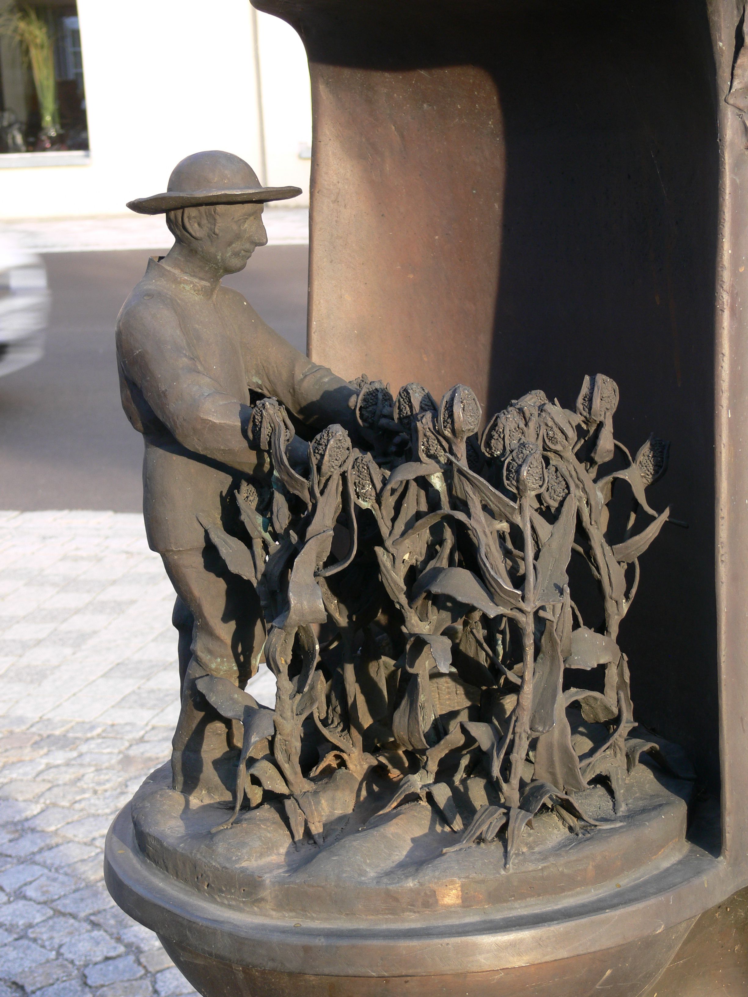 Baienfurt, Landkreis Ravensburg Kardeldenkmal von 2000, Detail: Anbau der Karden